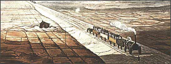 Дорога через болото Чэт Мосс - отрезок первой железной дороги Манчестер-Бирмингем (1830)